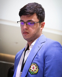 Nicat Abasov 2018-ci ildə